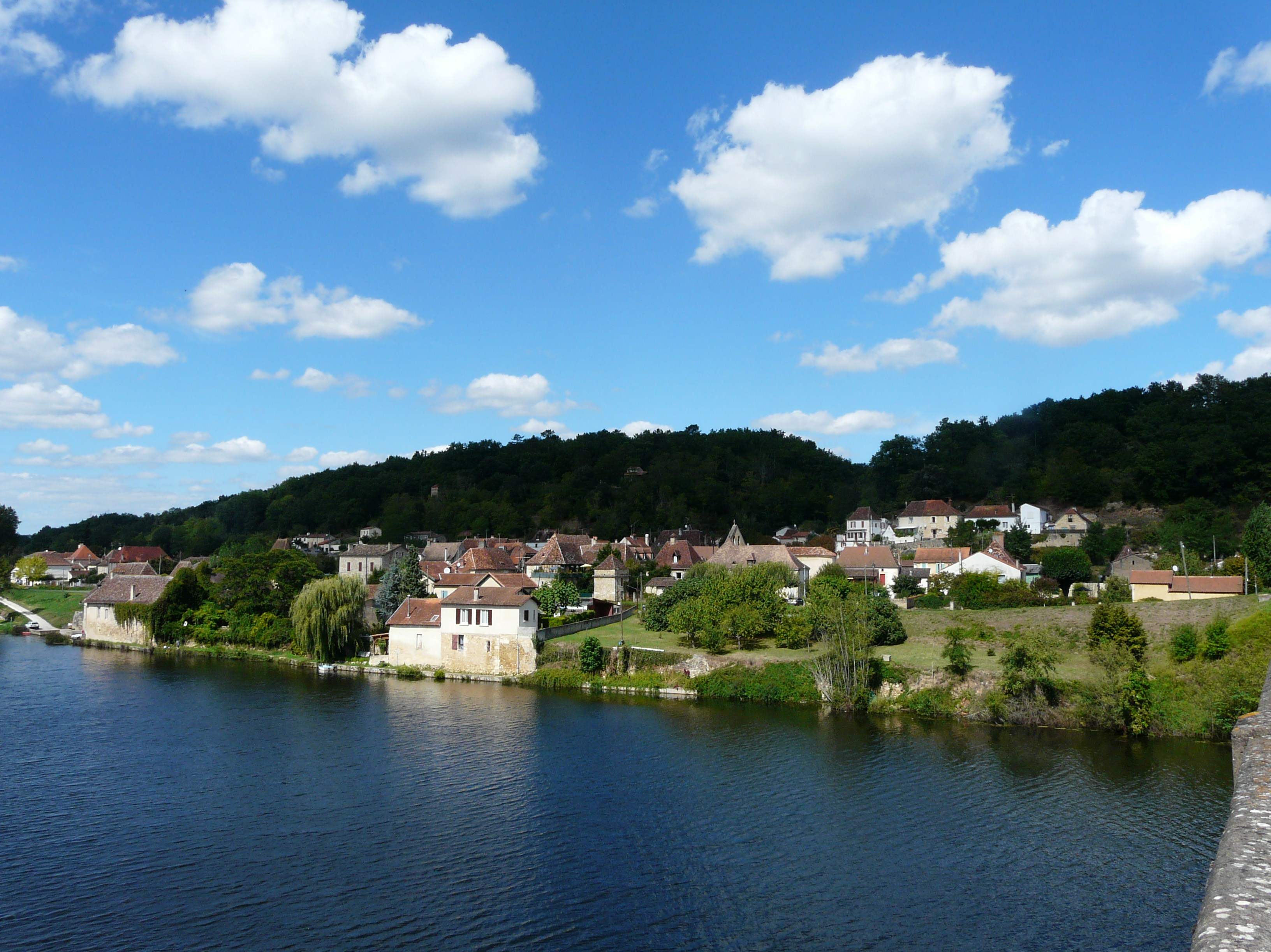 Au bord de la Dordogne, le bourg de Saint-Capraise-de-Lalinde, Dordogne, France.